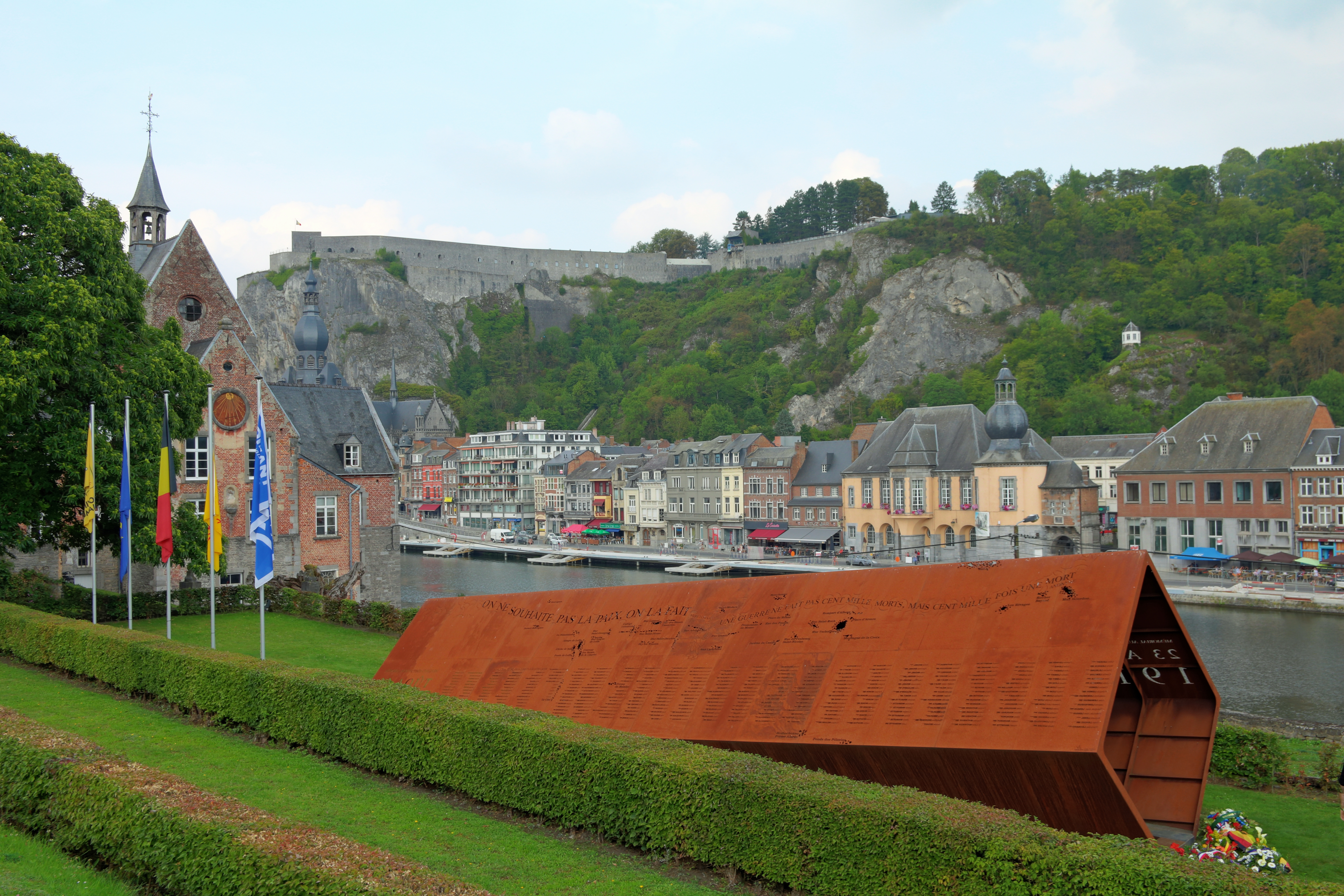 Mémorial 23 Aout 1914 in Dinant (Denkmal für das Massaker von Dinant).